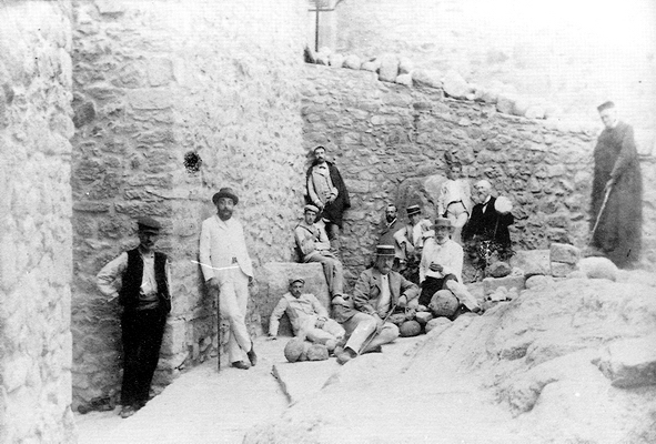 El comte de Peralada Tomàs de Rocabertí (darrere, amb vestit fosc) i altres acompanyants al castell de Requesens durant la seva reconstrucció vers 1898 o poc abans